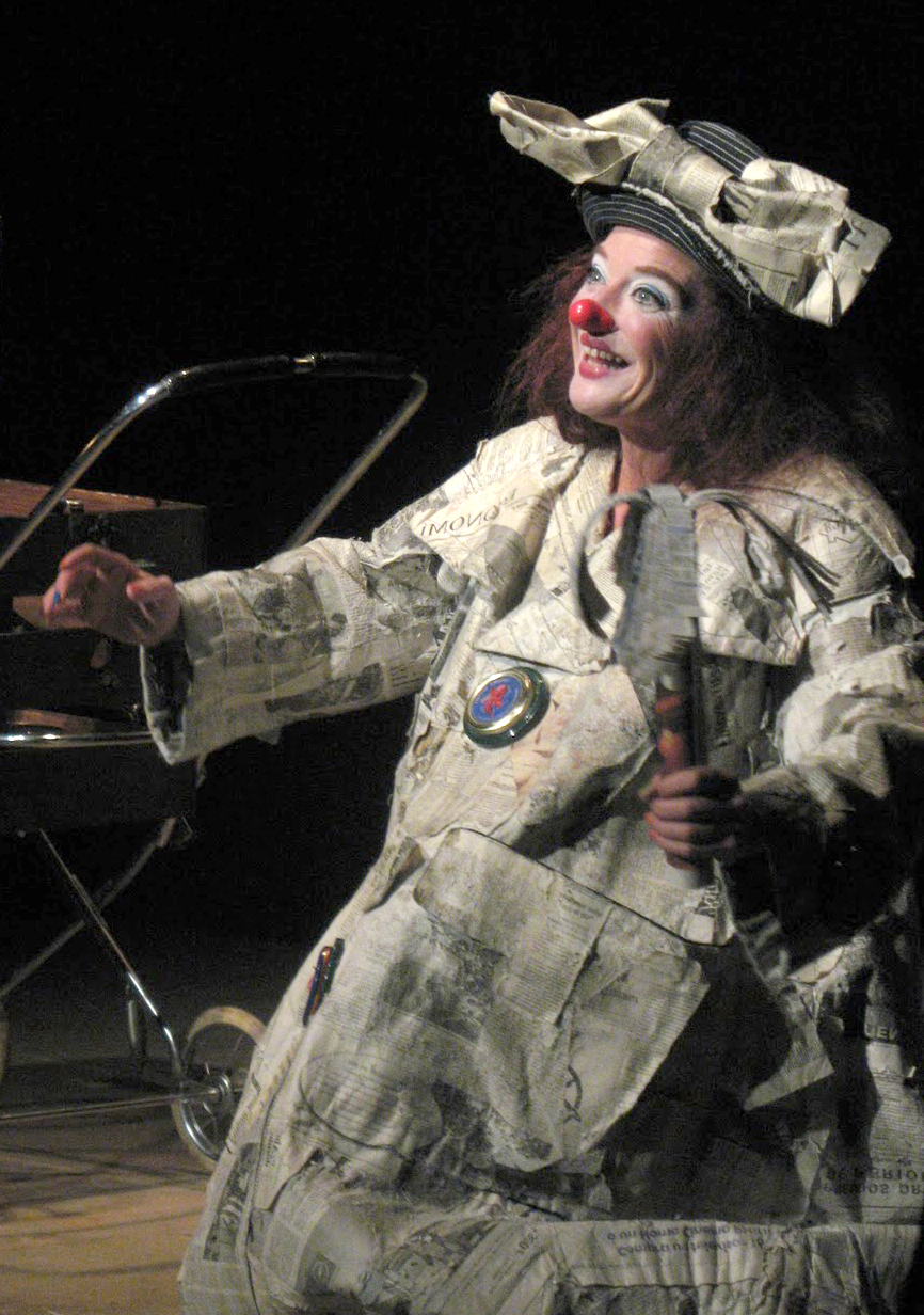 Pepa Plana en plena actuación.